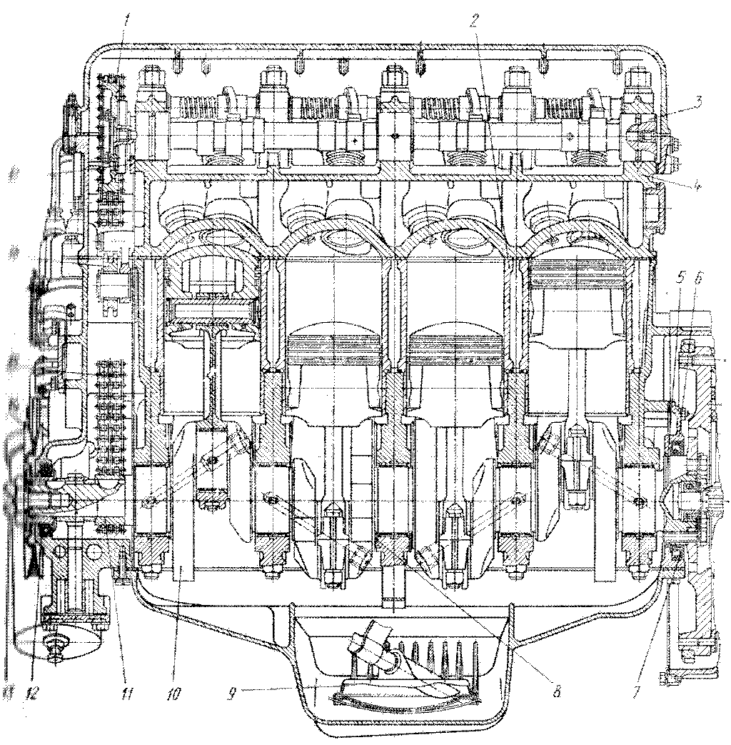 Продольный разрез двигателя модели 412: 1 — ведомая звездочка привода газораспределительного механизма; 2 —гильза цилиндров; 3 — распределительный вал; 4— головка блока цилиндров; 5 — маслосгонная резьба; 6 - крышка заднего сальника коленчатого вала; 7 и 12— двухкромочные самоподжимные сальники; 8 — упорное полукольцо; 9 — маслоприемник; 10 — коленчатый вал; 11 — ведущий звездочка привода газораспределительного механизма; 13 — храповик для пусковой рукоятки; 14 — шкив коленчатого вала; 15 — втулочная цепь привода газораспределительного механизма; 16 — звездочка натяжного устройства; 17 — упорный фланец распределительного вала